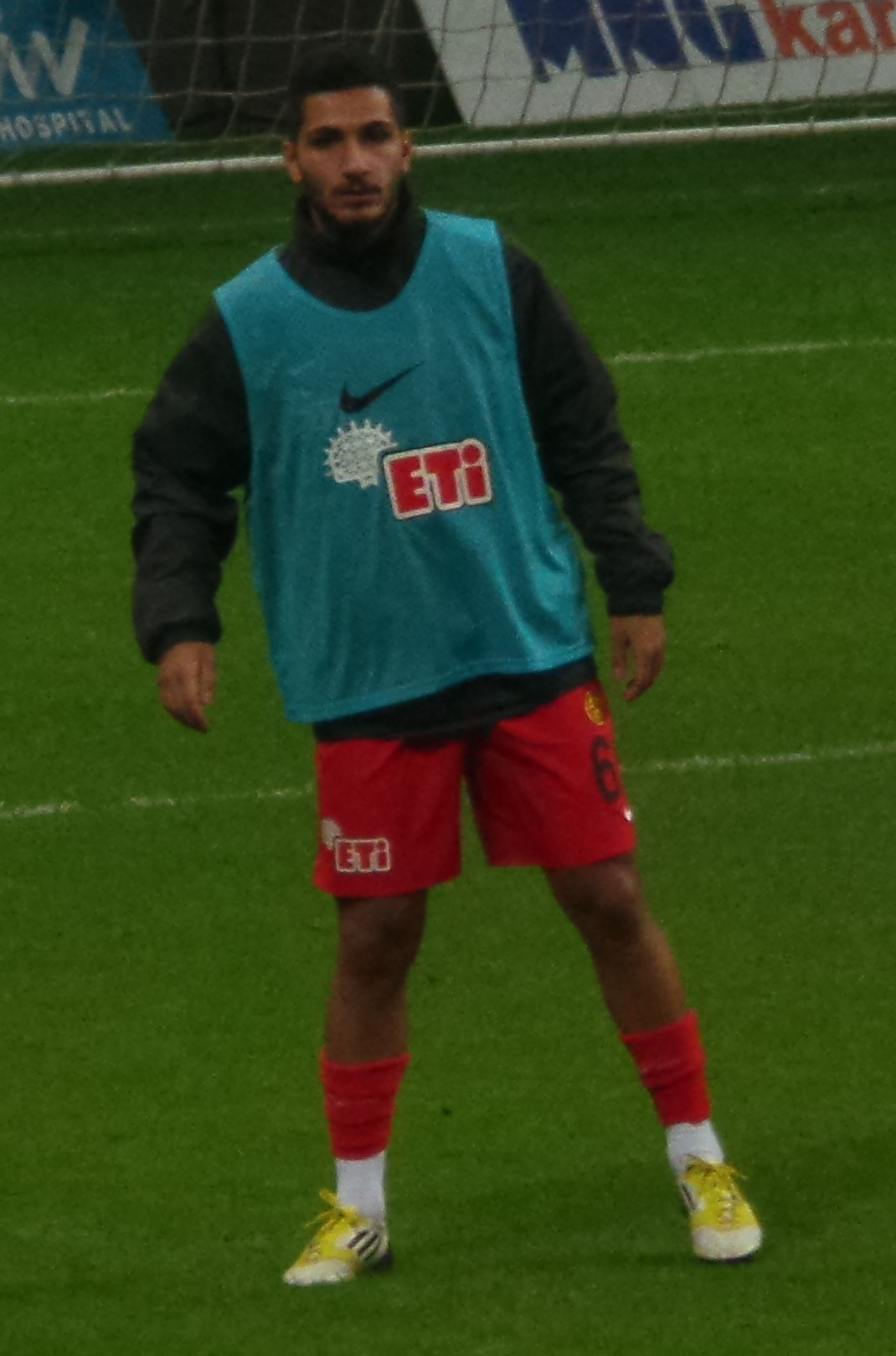 Kamil Ahmet Çörekçi